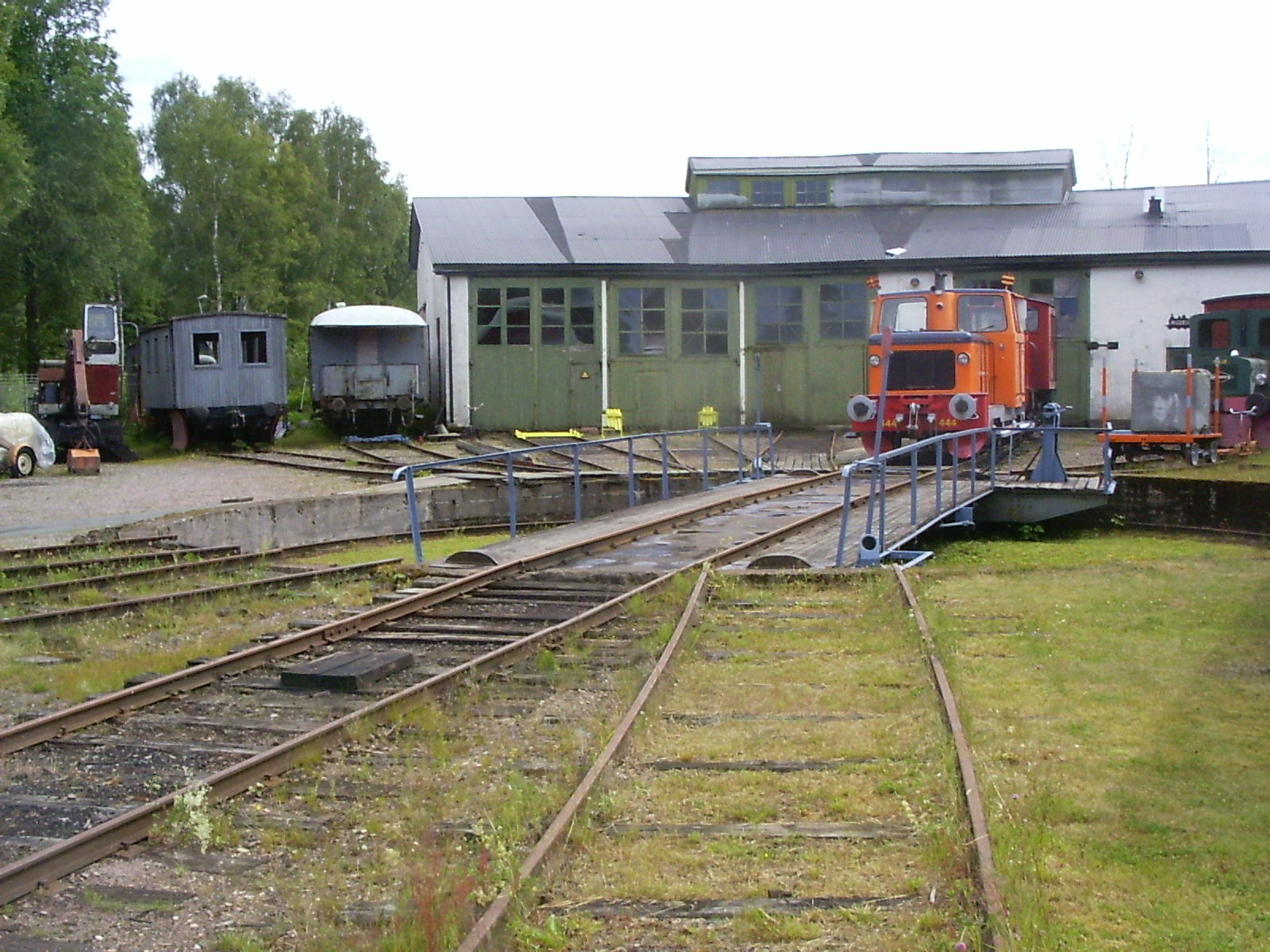 Järnvägsmuseum med Svanskogsbanan - JÅÅJ. Åmål, Åmål